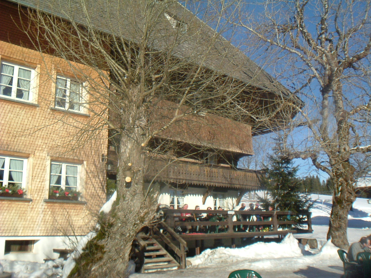 Blick auf den Raimartihof mit der Außenbewirtung